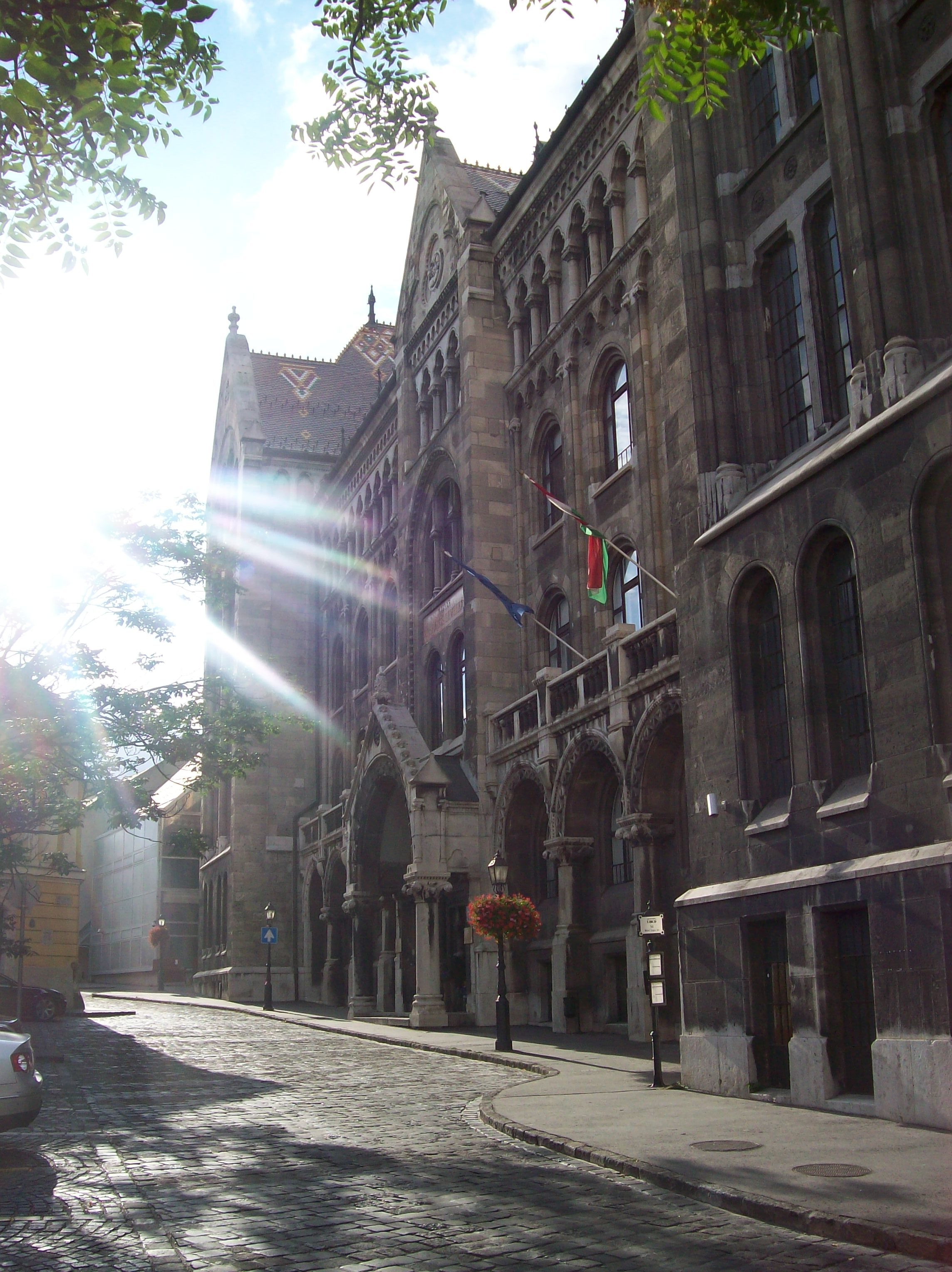 A Magyar Országos Levéltár Bécsi kapu téri épülete a Bécsi kapu felől fotózva Budapesten